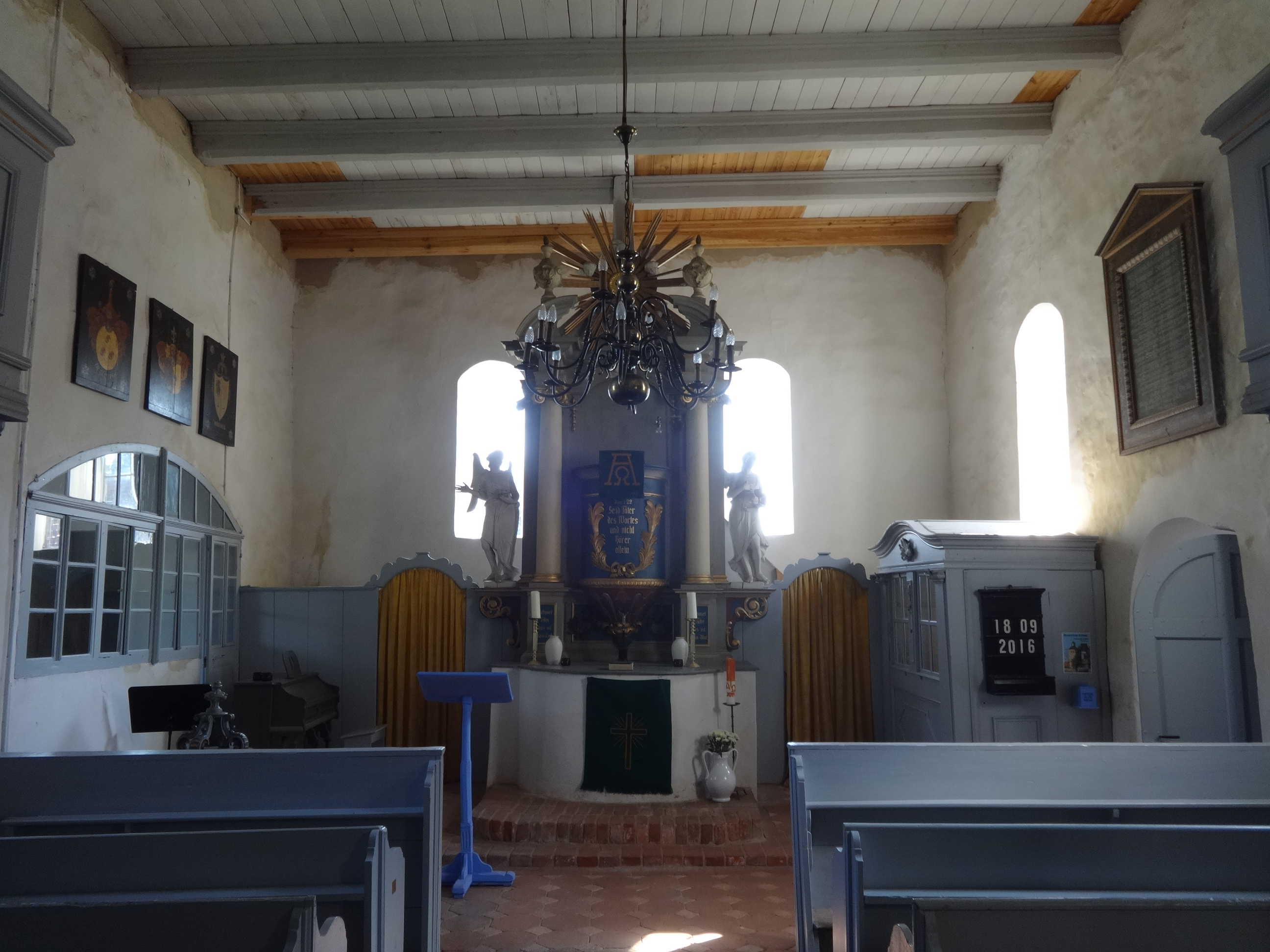 Die Dorfkirche in Fröhden ist eine Feldsteinkirche aus dem Anfang des 14. Jahrhunderts. Der Turm wurde im 15. Jahrhundert angebaut. Im Innern befinden sich unter anderem ein Altaraufsatz aus dem Jahr 1797 und eine Fünte aus dem Jahr 1851.